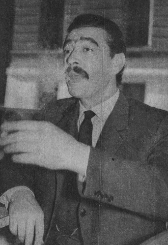 Fotografía delpoeta y compositor uruguayo Osiris Rodríguez Castillos